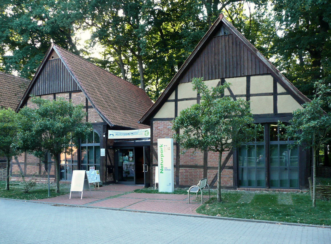 Naturparkzentrum Steinhude im Scheunenviertel